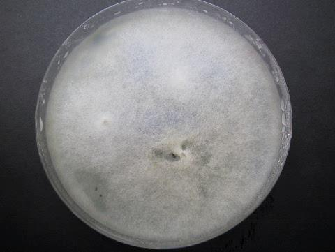 Mucor circinelloides - hodowla płytkowa